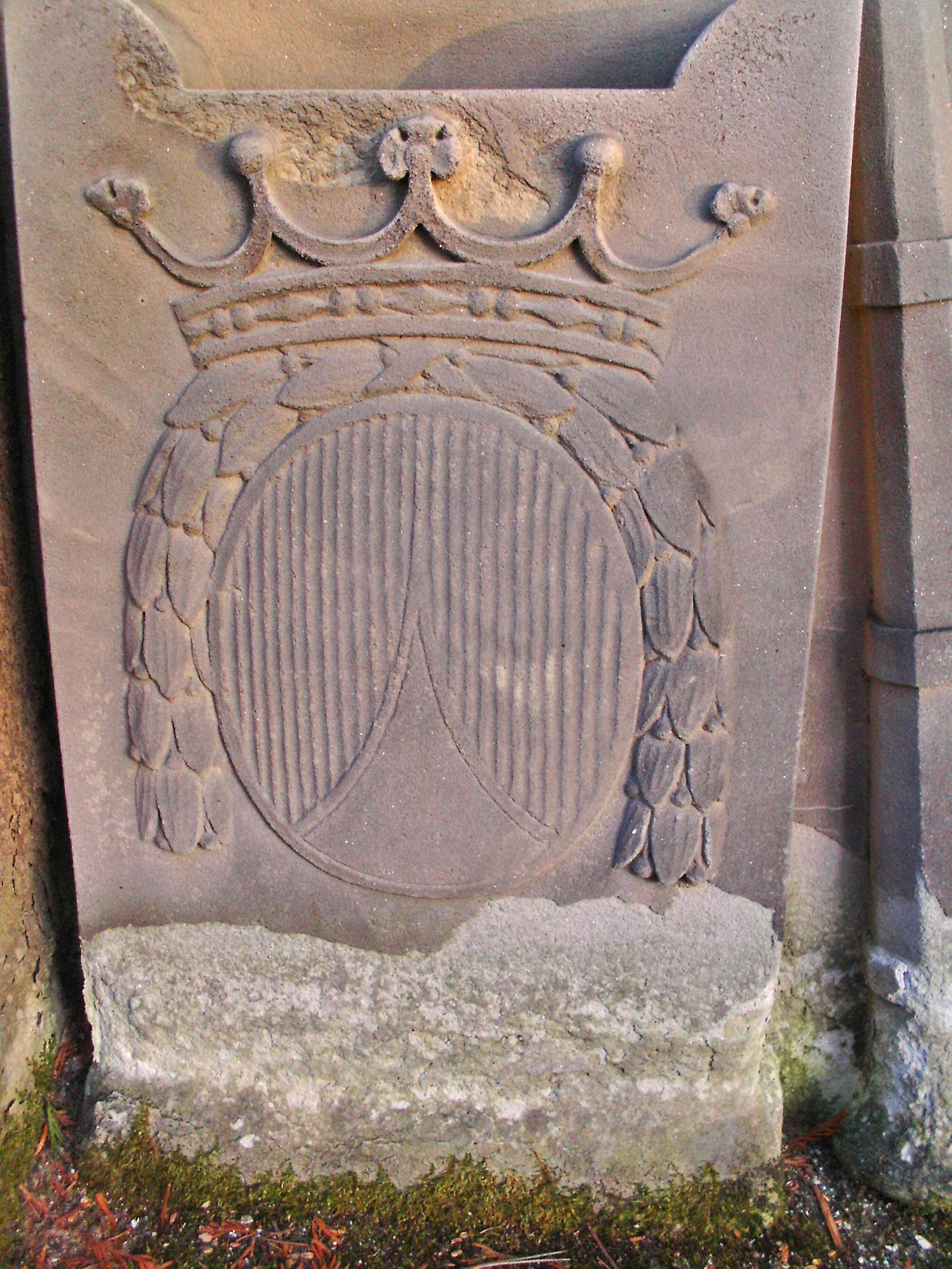 Wappen der Freiherrn von Stumm, Hauptfriedhof Mannheim, Grab von Christian Philipp von Stumm